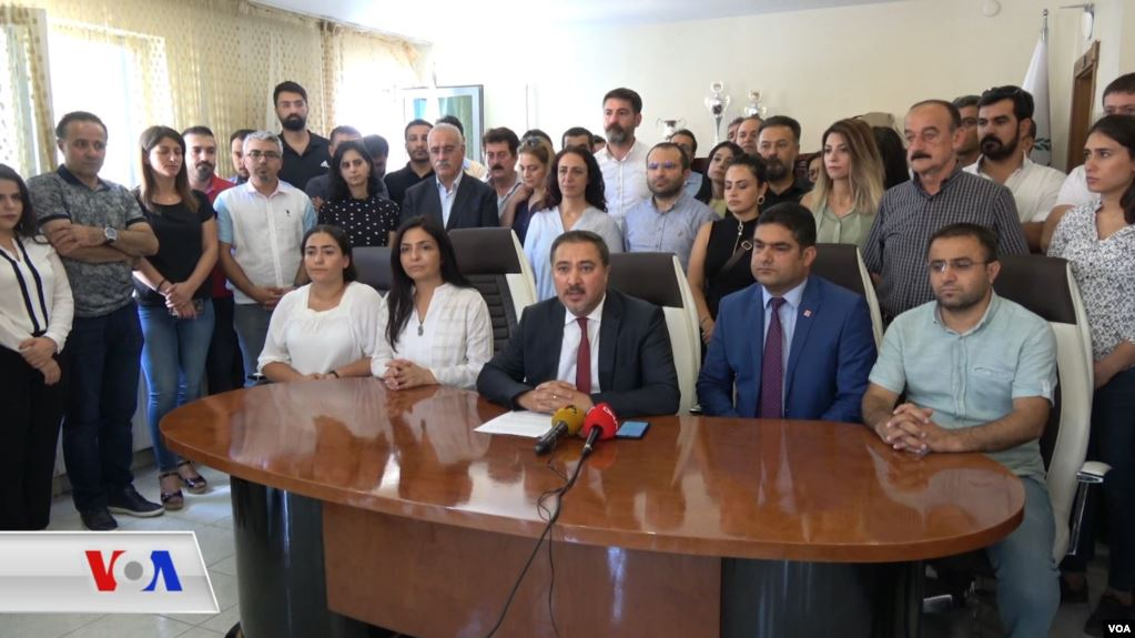 Van Barosu'nda toplanan CHP, HDP, KESK, DİSK, TMMOB temsilcileri ve Baro avukatlarının da aralarında bulunduğu 26 sivil toplum kuruluşunun kayyıma tepki açıklaması.